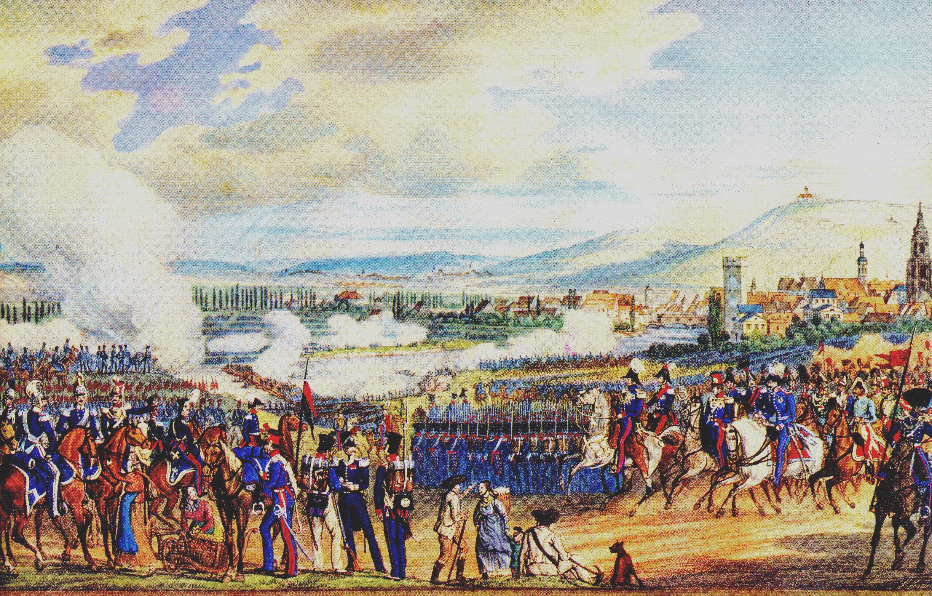 aus: Schmolz, Helmut u. Hubert Weckbach: Heilbronn - Geschichte und Leben einer Stadt, Weißenhorn.